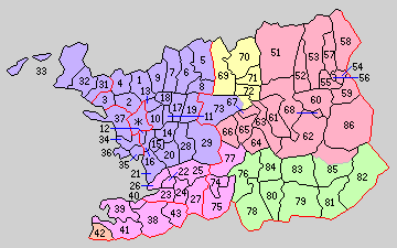 和歌山県海草郡・那賀郡の町村制時点の町村。